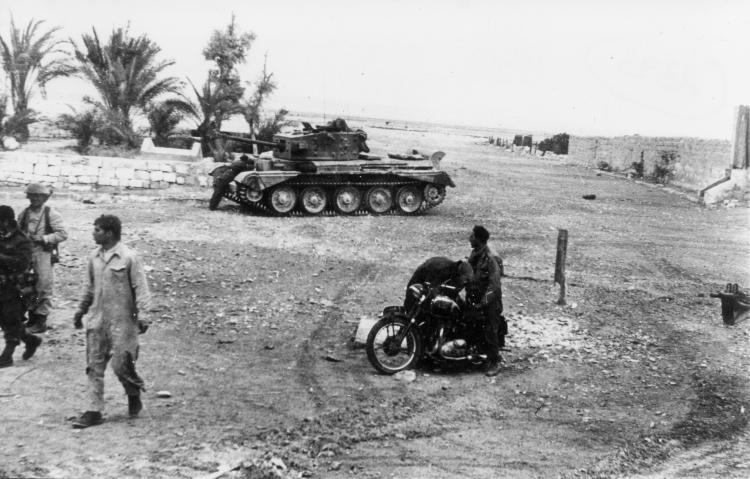 82nd armor battalion of the 8th armored brigade in Abu-Ageila, Egypt, during operation Horev